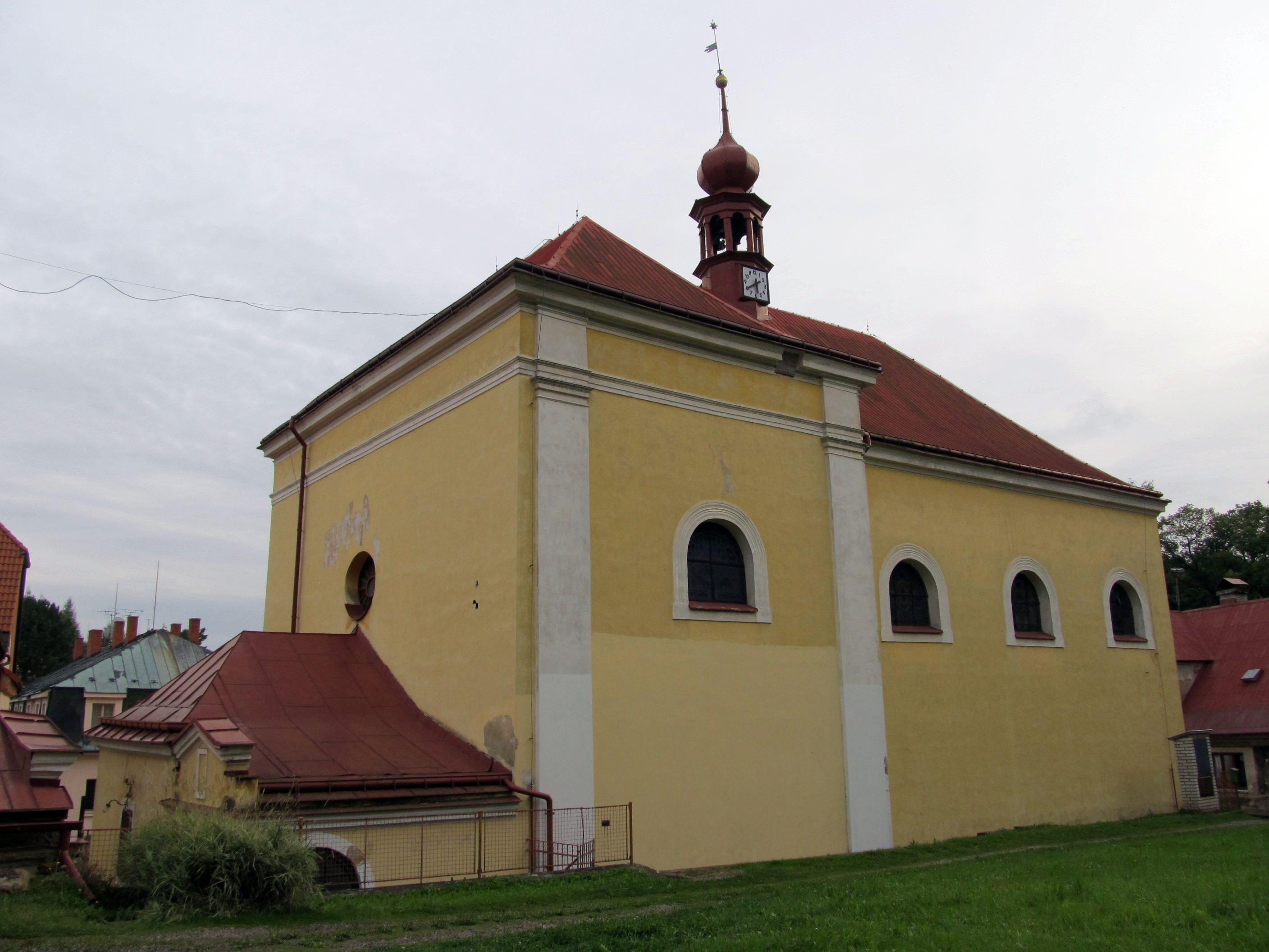 Kostel P. Marie (Malé Svatoňovice), Malé Svatoňovice